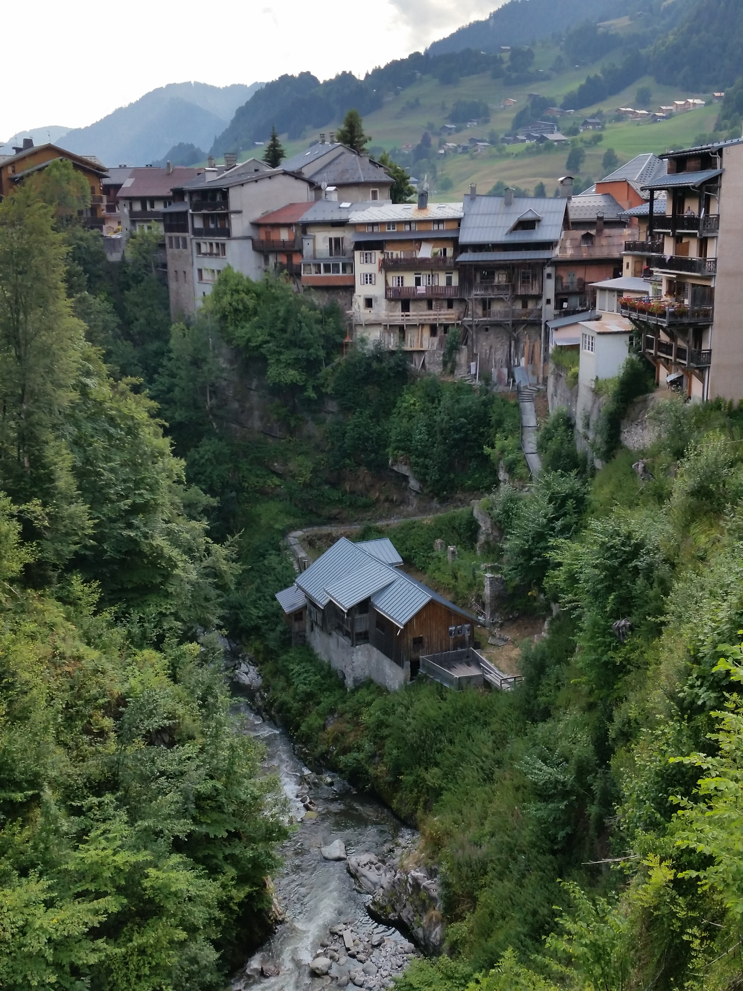 Vue depuis le pont de l'Abîme sur la D2188 sur les gorges de l'Arly (vers l'aval) et l'ancien moulin, avec le village au-dessus (août 2018).